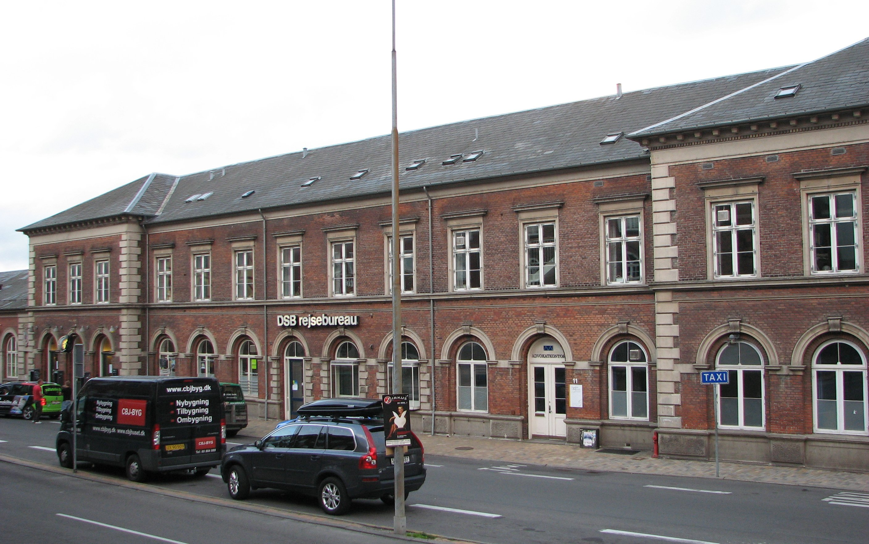 Svendborg railroad station